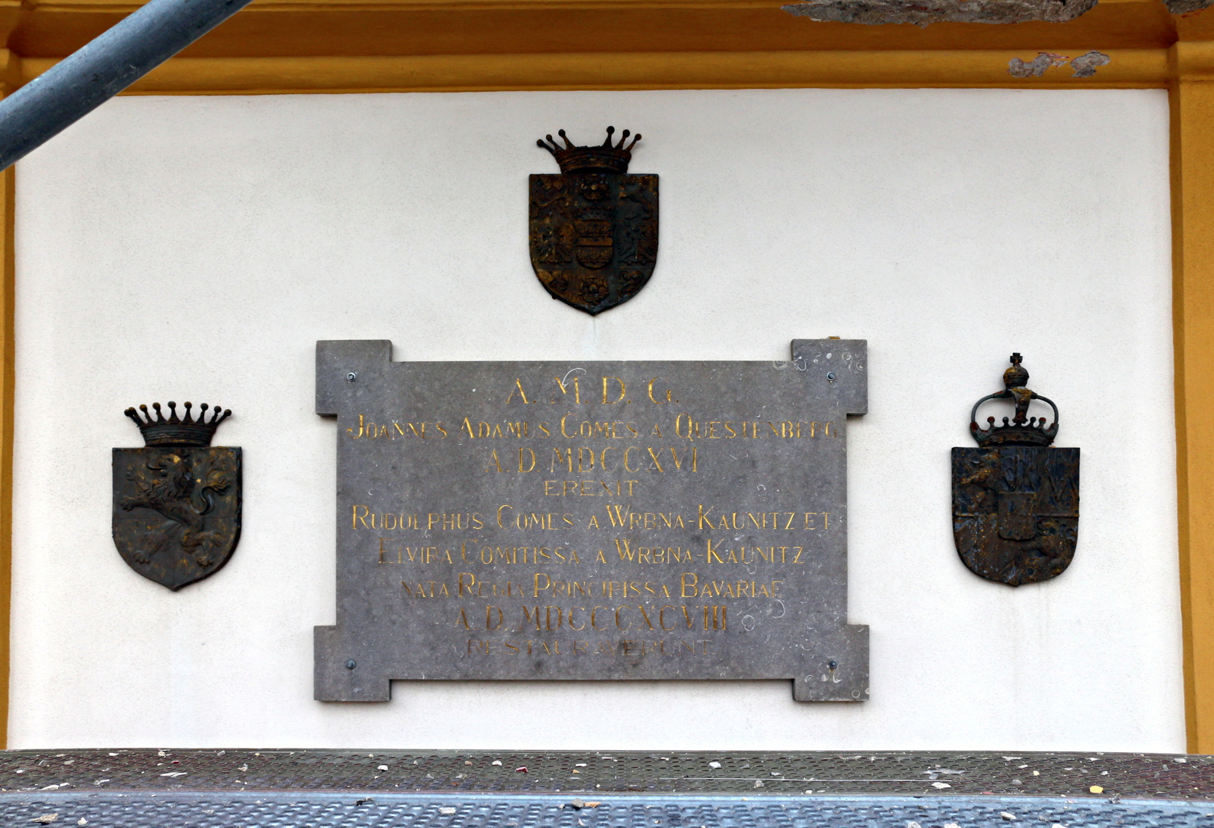 Jaroměřice nad Rokytnou náměstí nápis na sloupu